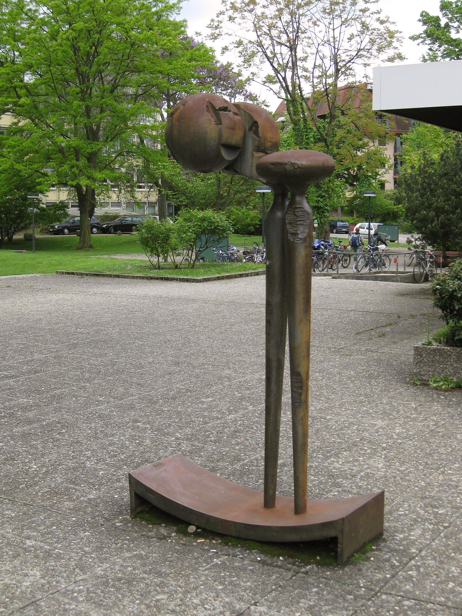 Rudolf Hoflehner, Venus von Krieau (Figur 81), 1964, - Deutschland, Baden-Württemberg, Freiburg im Breisgau, Institut für Biologie II + III, Schänzlestr.